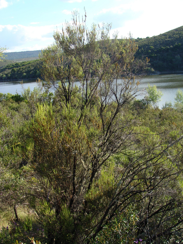 Erica scoparia at Parque Nacional de Monfragüe